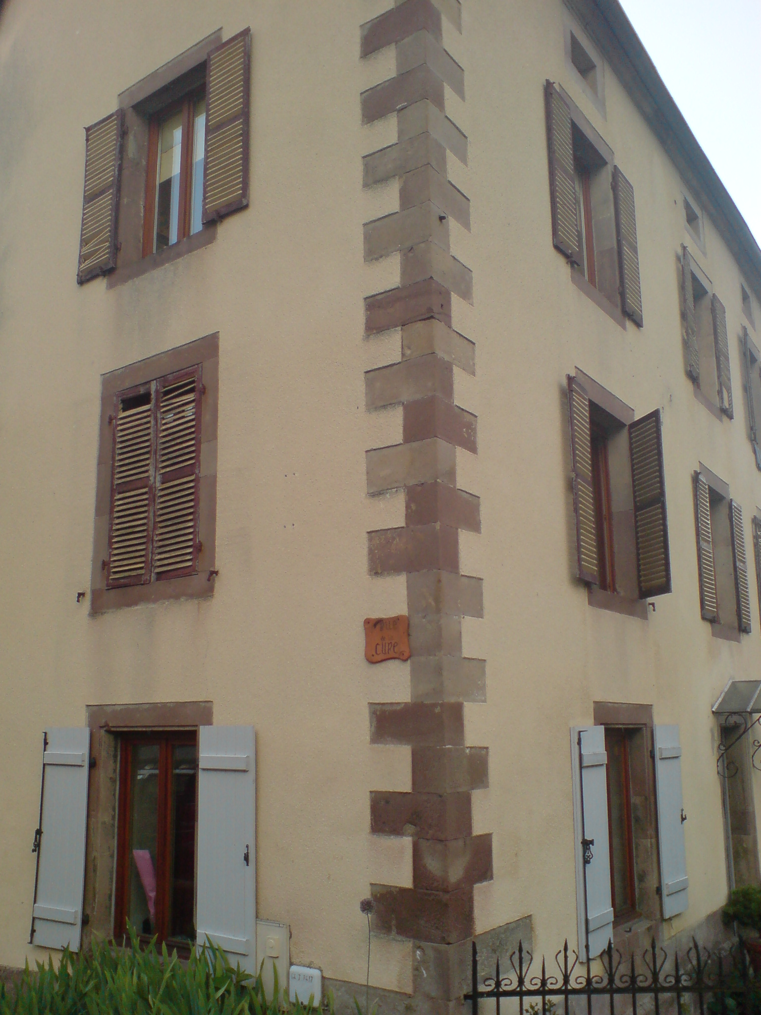 Travail arcitectural intéressant pour l'altérnance des grès.